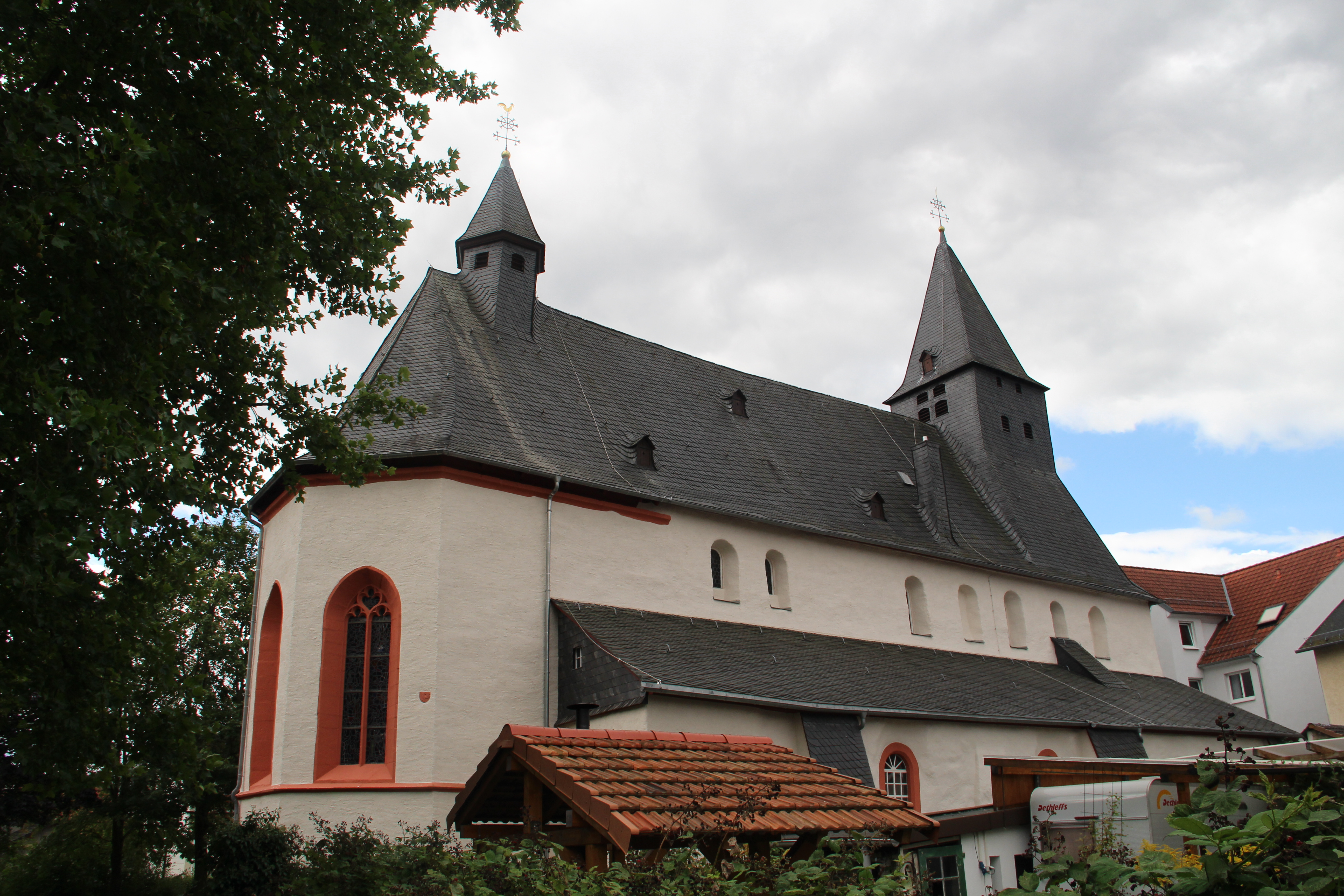 Martinskirche Gladenbach